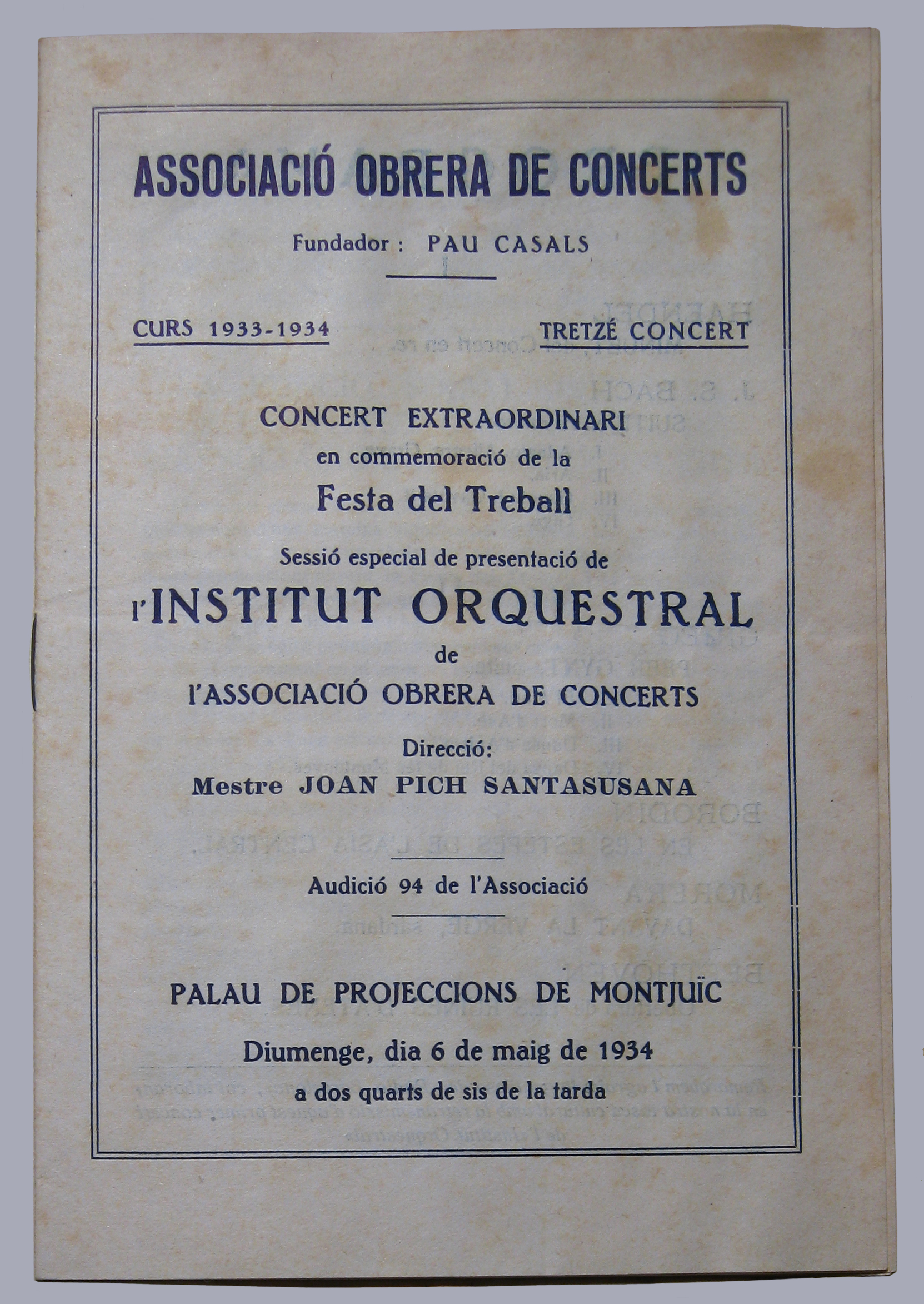 Reproducció del programa del concert de presentació de l'Institut Orquestral de l'Associació Obrera de Concerts celebrat el dia 6 de maig de 1934 al Palau de Projeccions de Montjuïc de Barcelona, sota la batuta de Joan Pich i Santasusana.Arxiu Família Pich Santasusana.